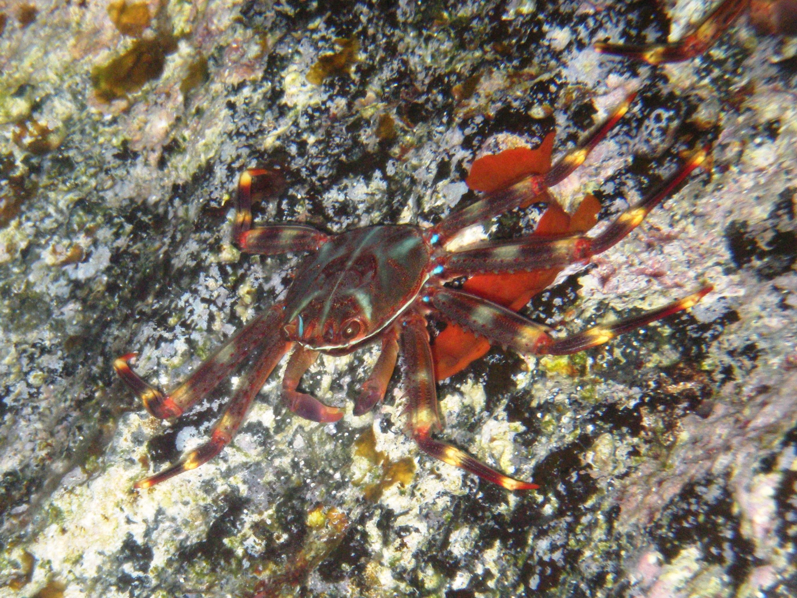 Percnon gibbesi Linosa, Sicily